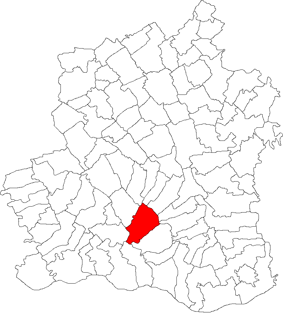 Categorie:Hărţi ale judeţului Teleorman